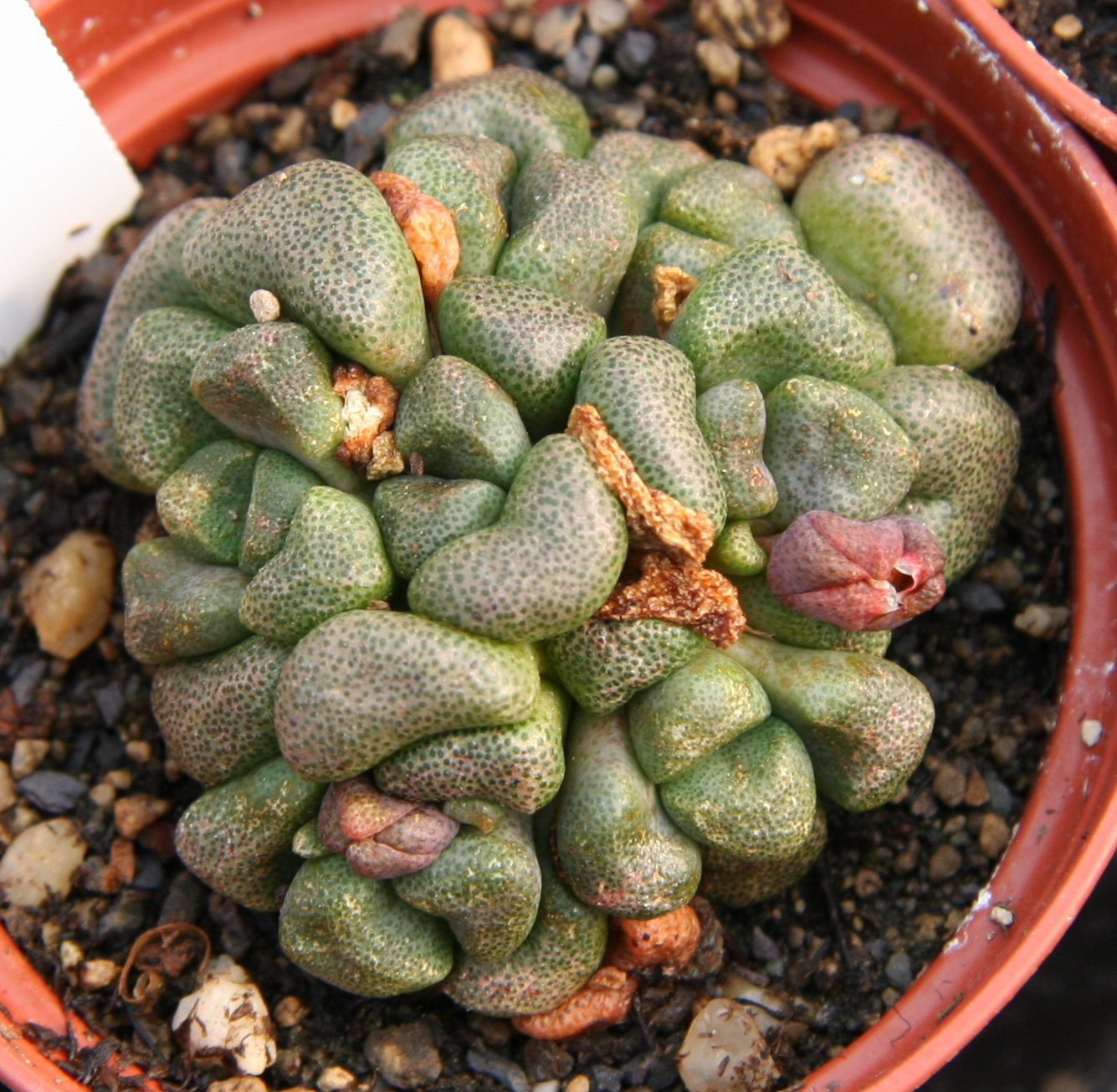 Aloinopsis schooneesii in Kultur bei Kakteen-Haage in Erfurt